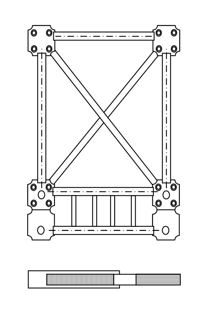 Рама крепления КБ-573 - мой чертёж